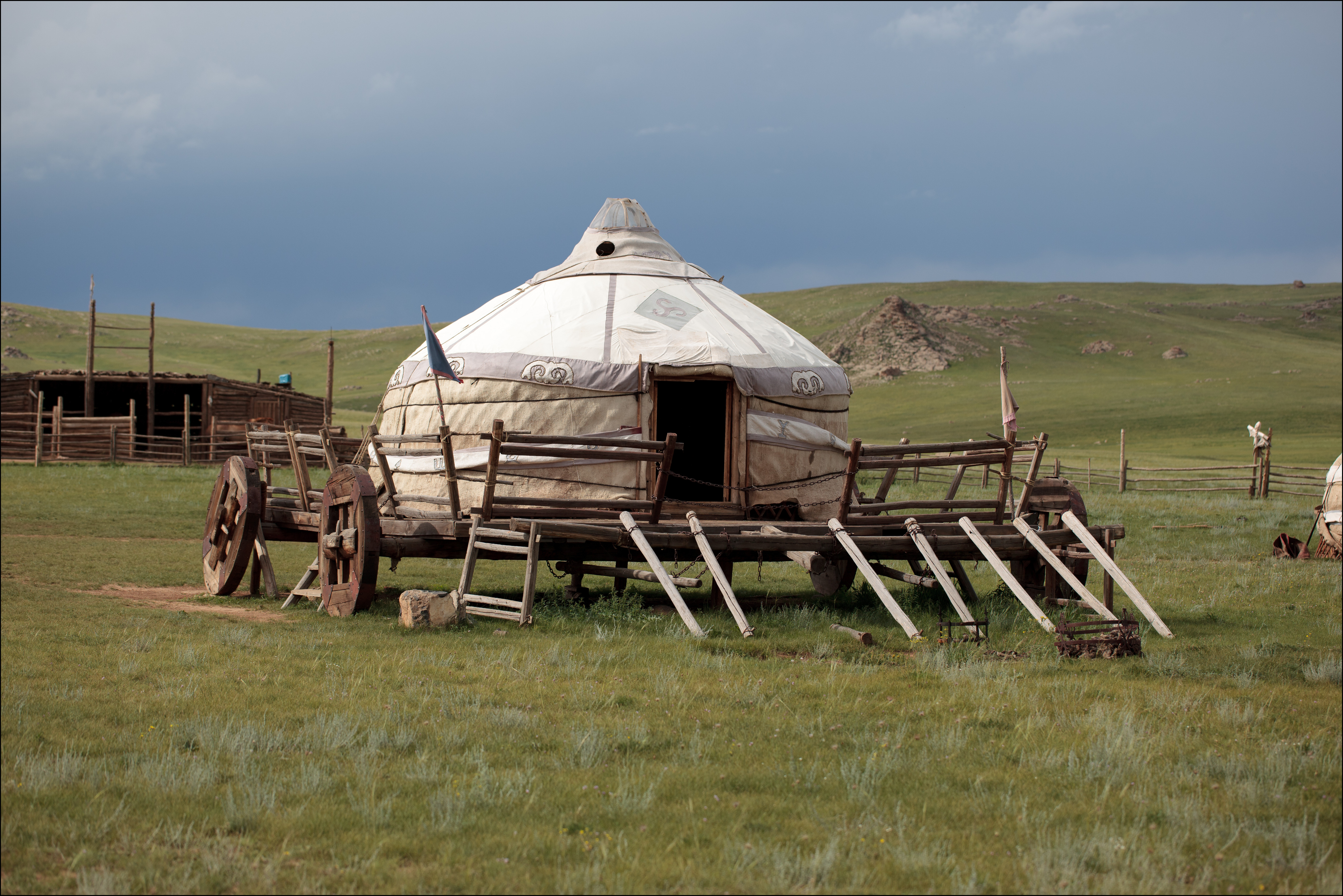 Une yourte ou iourte [jurt] est l'habitat traditionnel (tente en peau ou en feutre) des nomades mongols et turcs qui vivent en Asie centrale, notamment au Kirghizstan, au Kazakhstan et au Karakalpakistan. L'étymologie du mot est d'origine turque yurt.